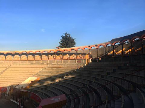 plaza de toros de Apizaco